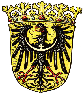 Wappen der preußischen Provinz Niederschlesien zur Zeit der Weimarer Republik.